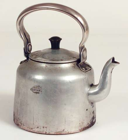 Kaffekjele i aluminium merket Høyang/710-1/, ant. fra 1950-årene. Diameter 13. cm. Foto Anne-Lise Reinsfelt/Norsk Folkemuseum, NF.1957-0360AB.